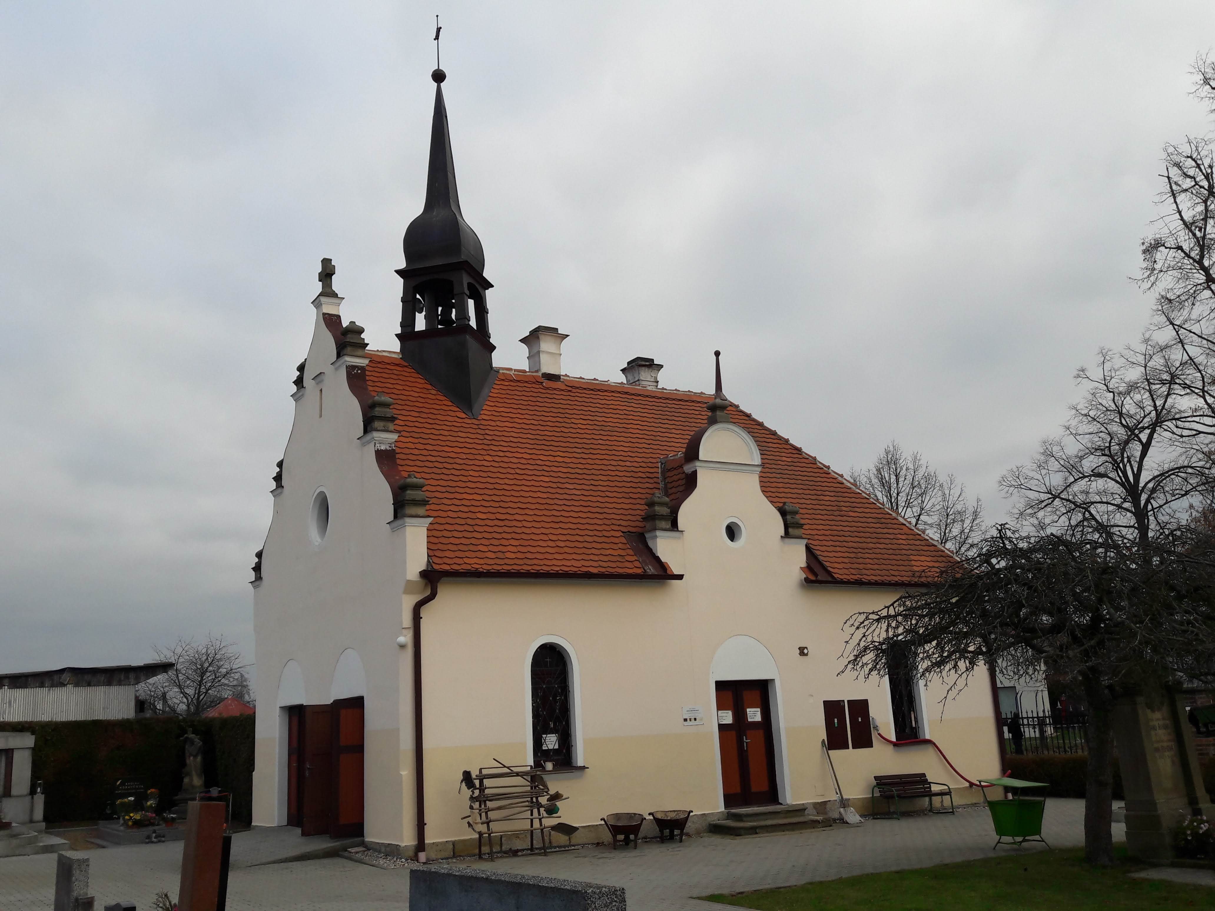 Hřbitovní kostelík na hřbitově pod Františkem v Chlumci nad Cidlinou. Autorem je architekt Jan Vejrych.